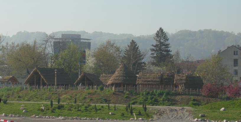 Arheoloski park sojenica u Tuzli